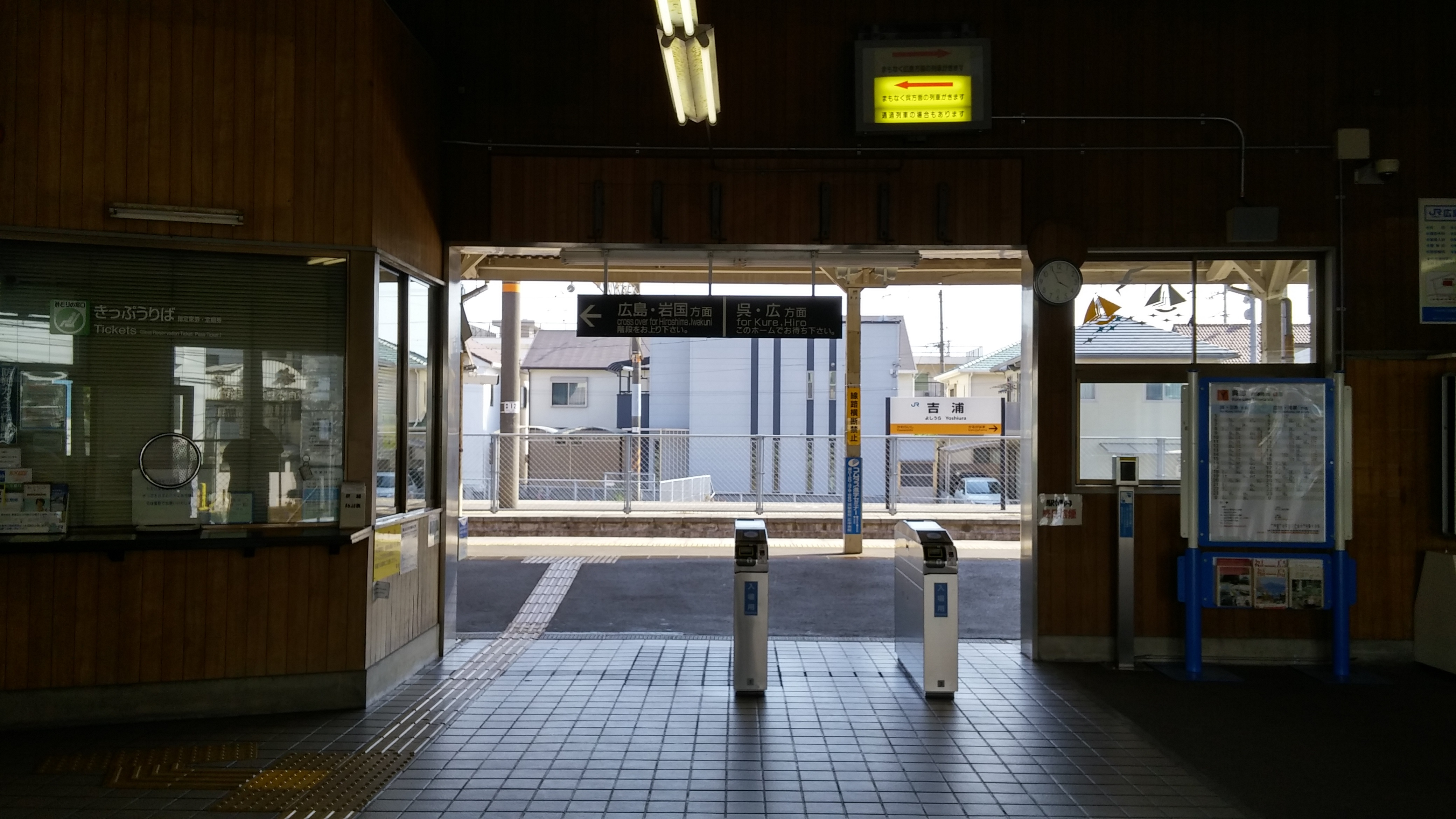 JR吉浦駅改札口